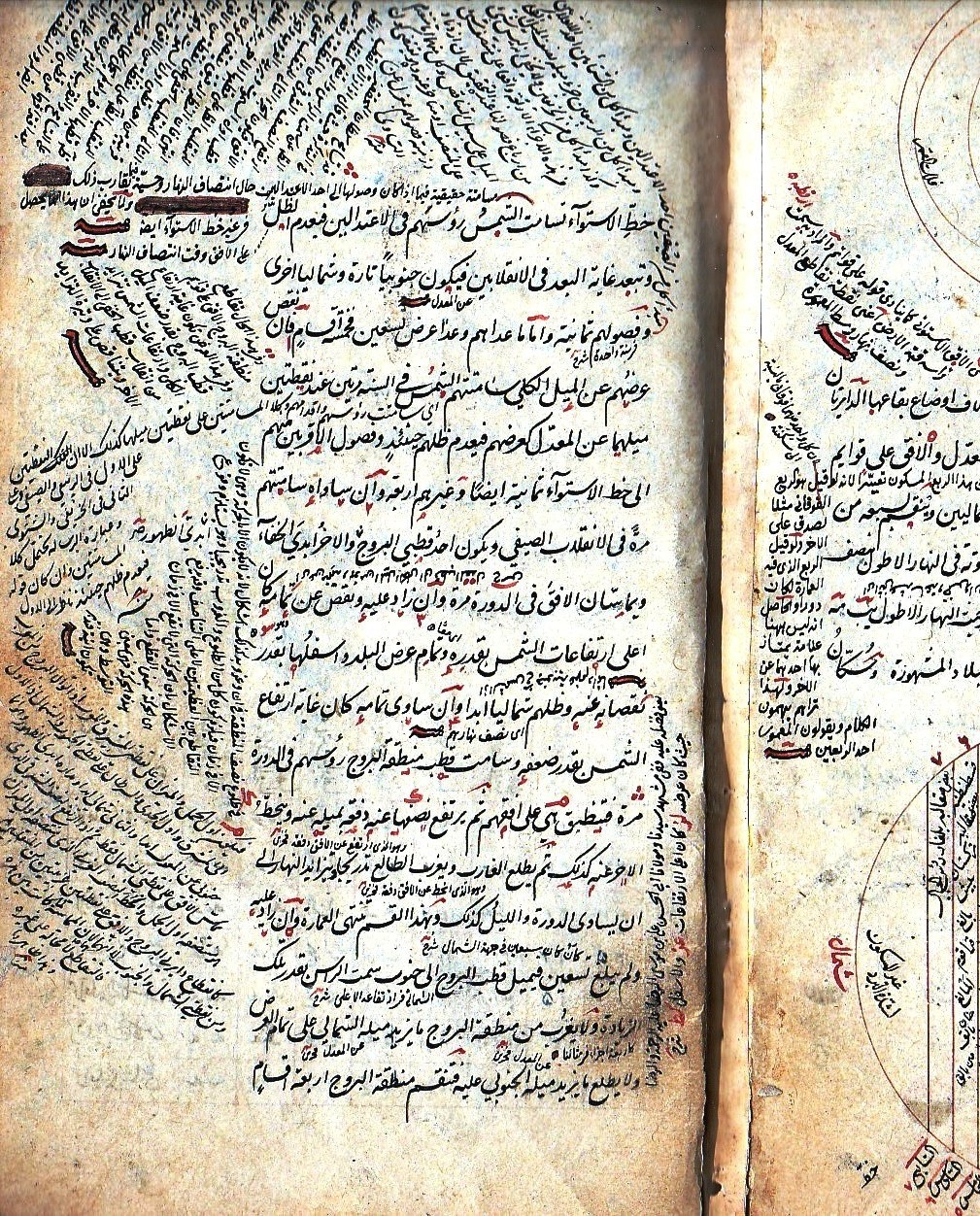 مخطوط باللغة العربية في علم الهندسة والفلك من تأليف بهاء الدين العاملي وعلى غلاف المخطوط كتب اهداء الشيخ نعمان خير الدين الآلوسي إلى شيخه قاسم أفندي المفتي عام 1273هجري/ 1856م، في بغداد